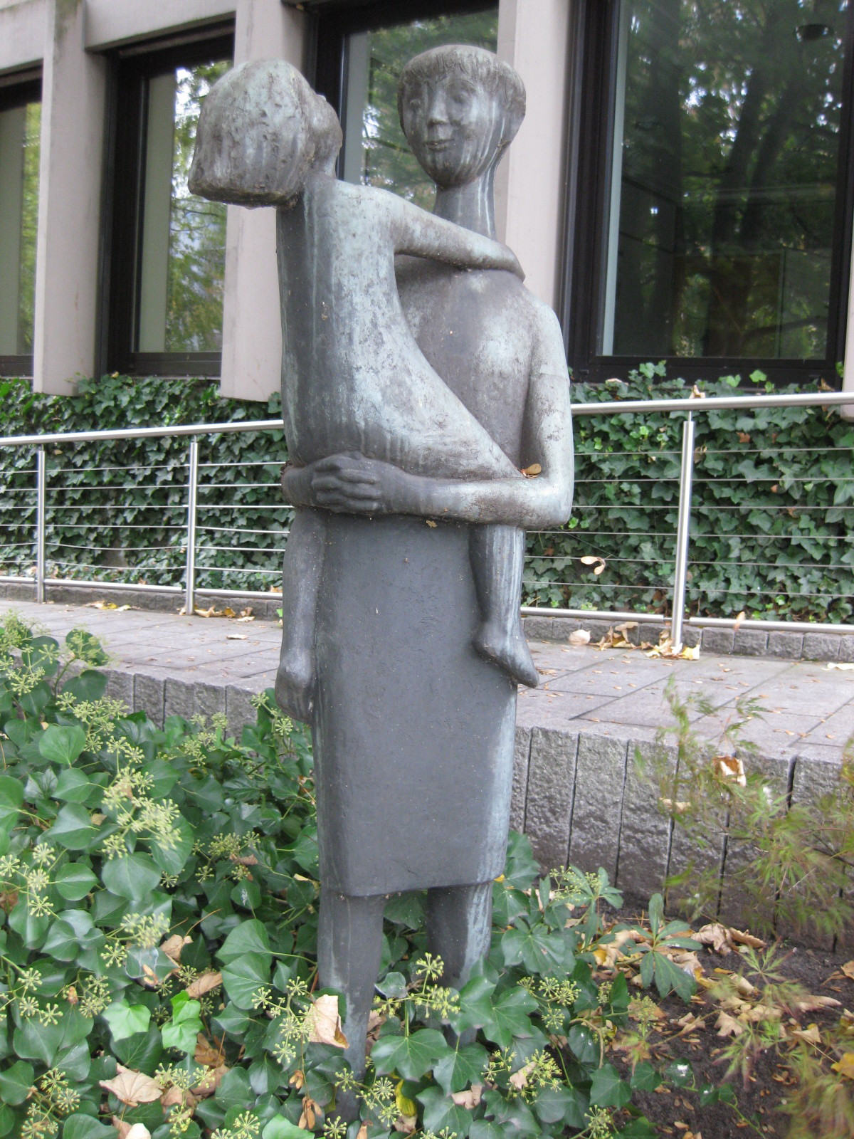 "Geschwister" von Walter Mellmann in Osnabrück, Bronze, 1970er-Jahre, Standort Hasetorwall/Stüvestraße